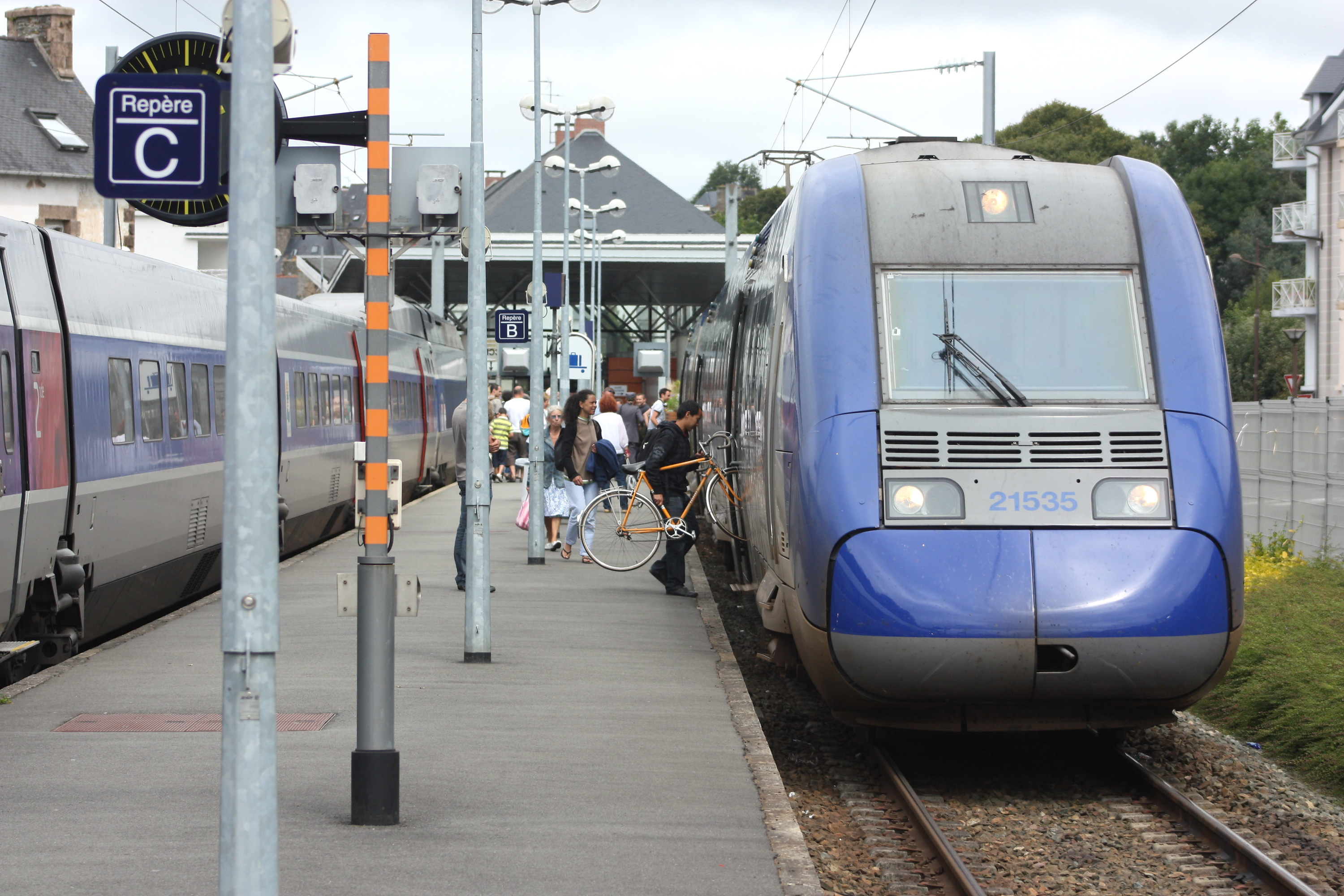 La Z 21535/6 prête au départ à Lannion pour Guingamp au TER54714 charge ses voyageurs.